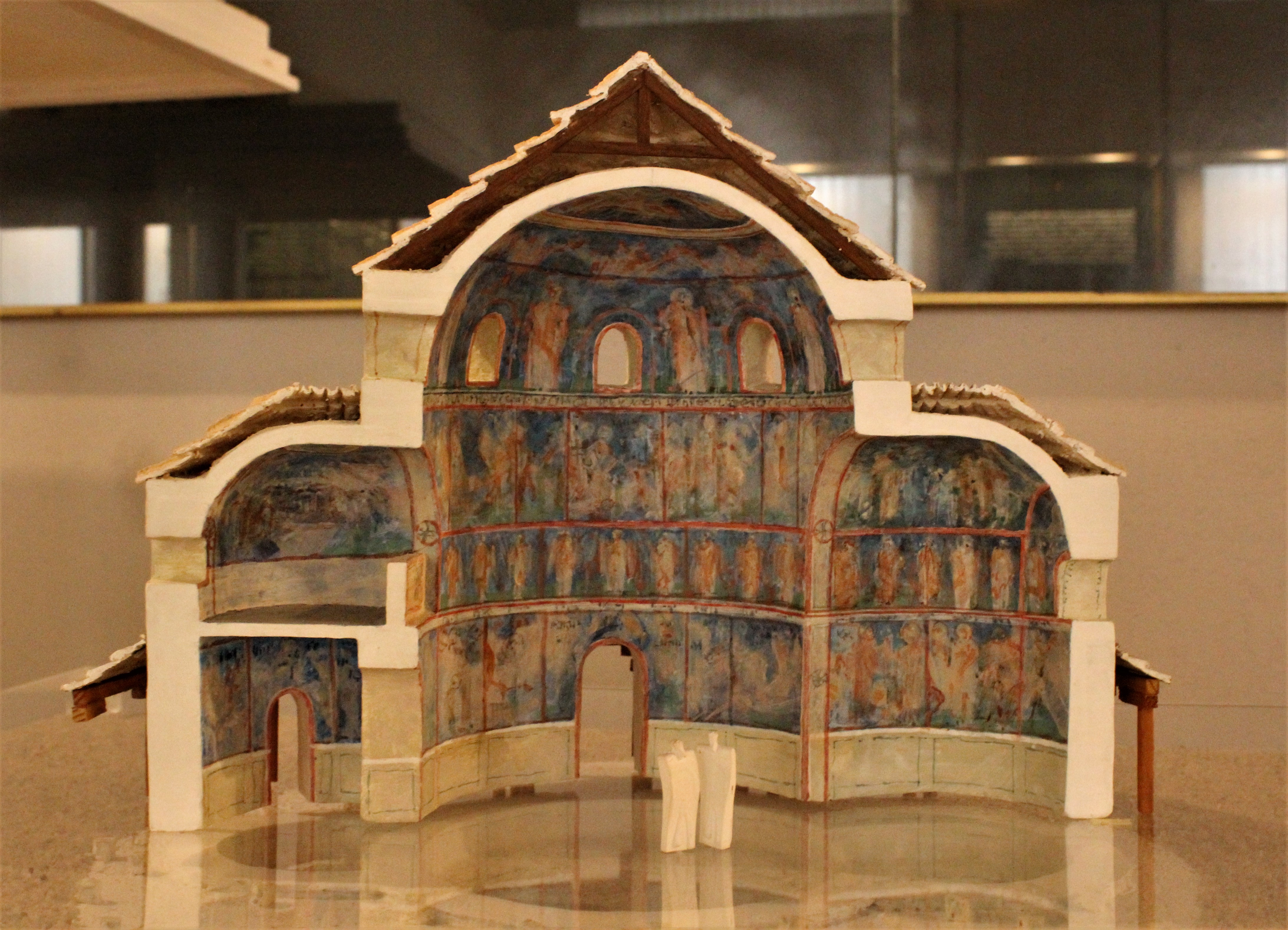 Moravian Basilica 9th century